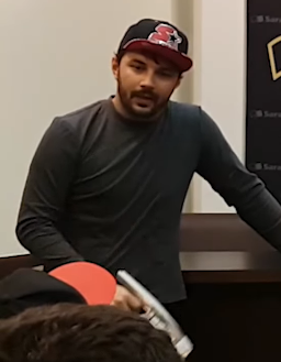 Encontro para fãs de dublagem na Saraiva.